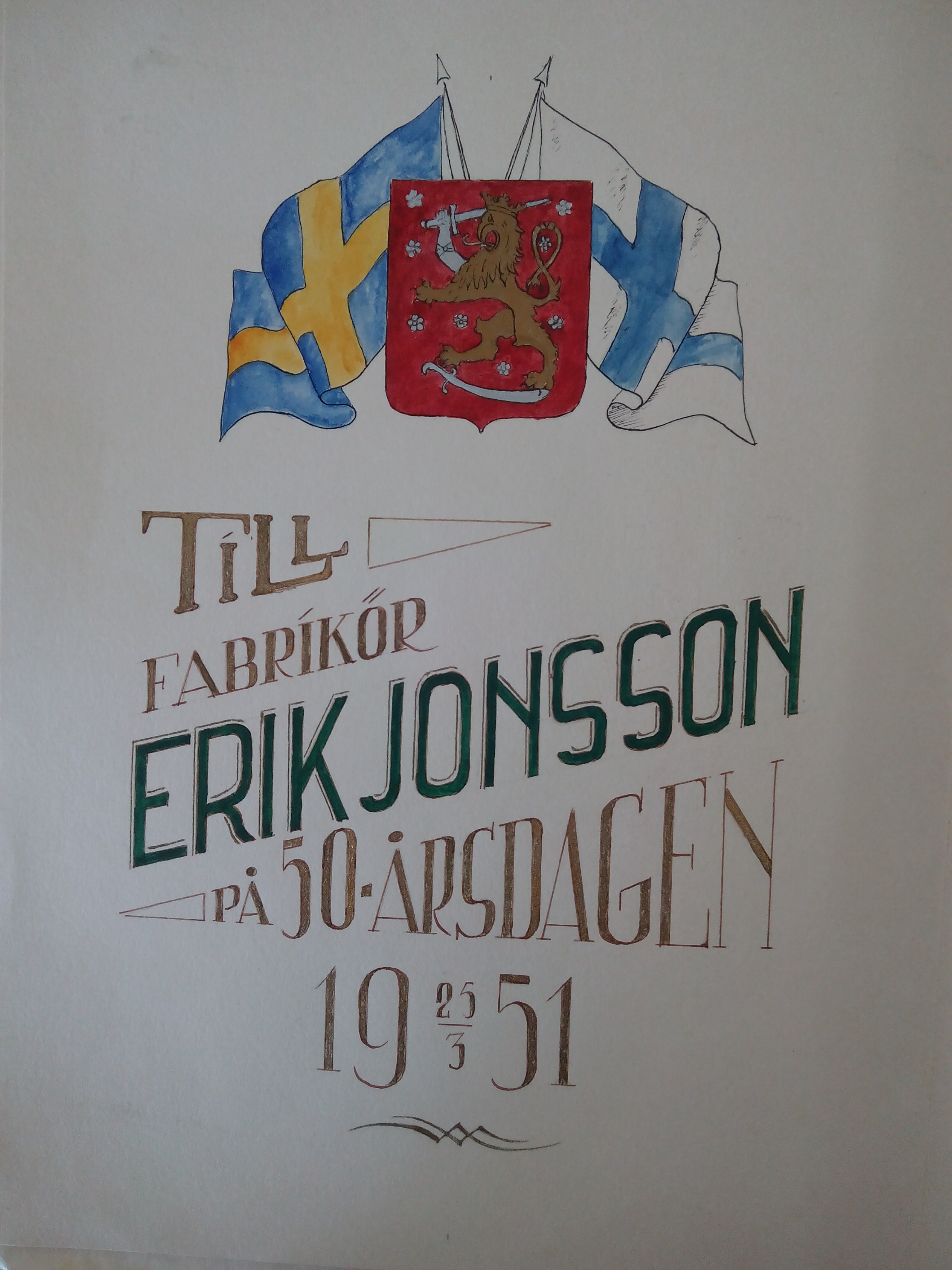 50v Juhla-adressi